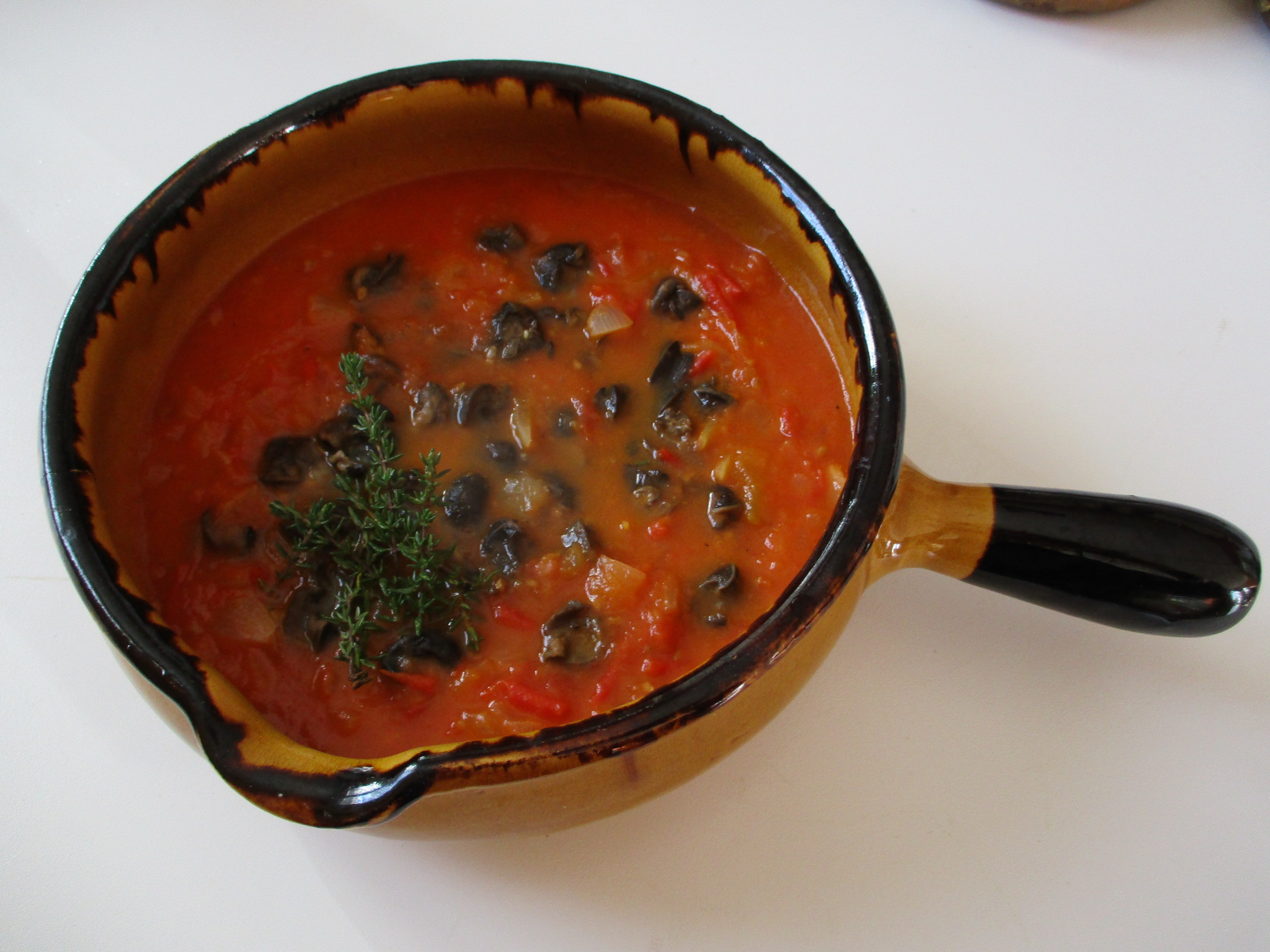 Escargots à la provençale à la sauce tomate